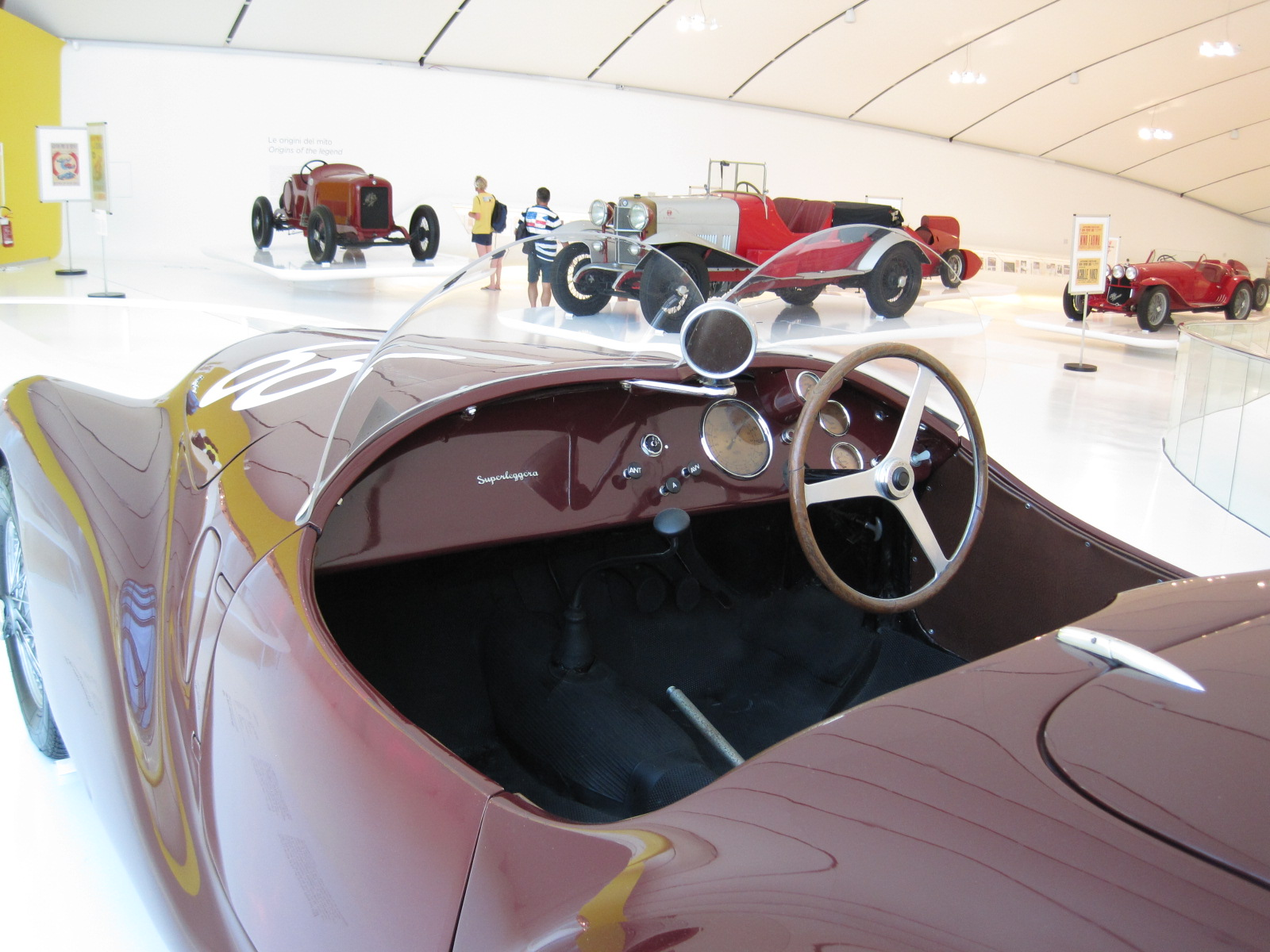 Automobiles in Enzo Ferrari Museum in Modène - Auto Avio Costruzioni 815 - 1940